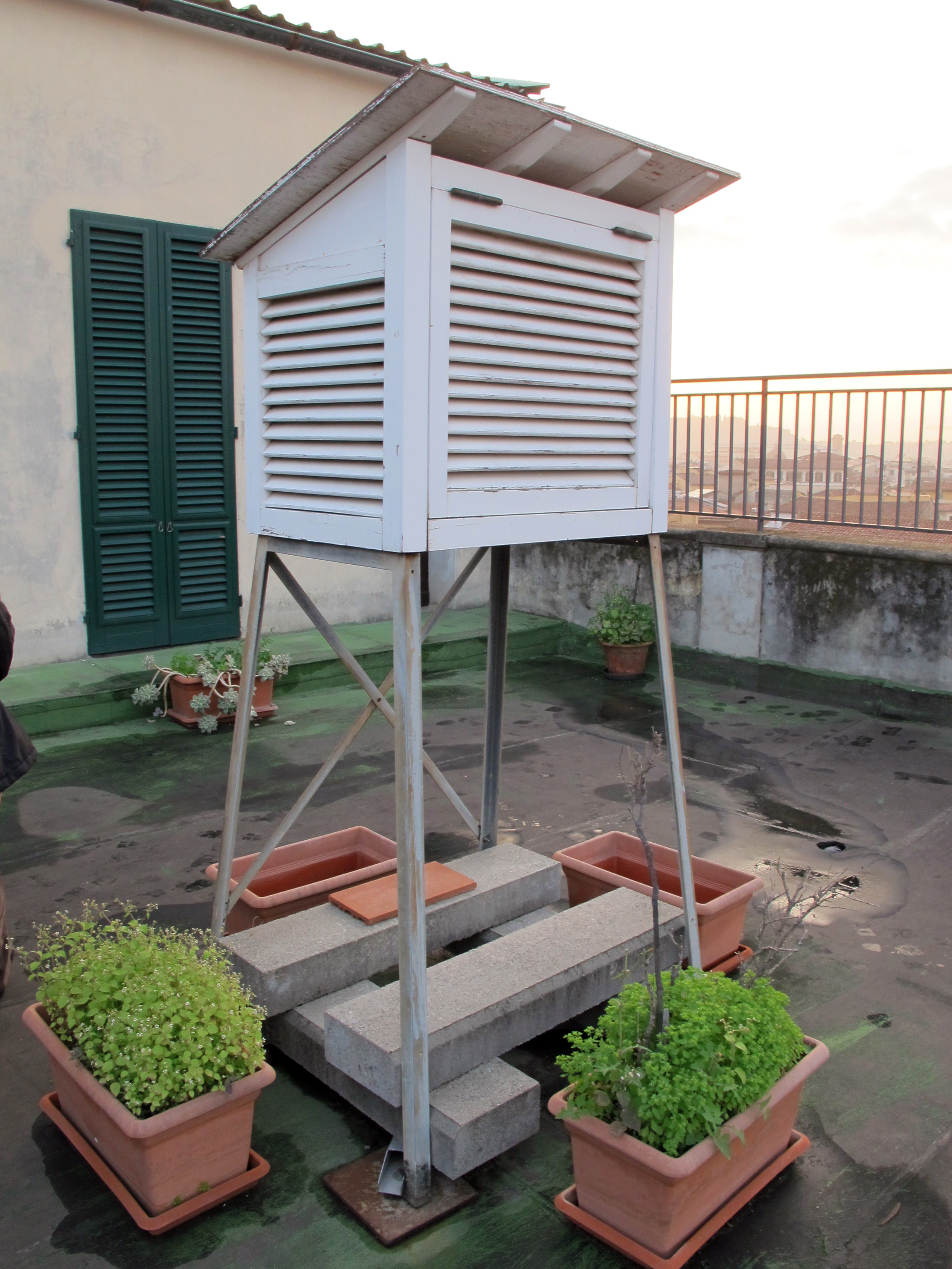 Osservatorio ximeniano, stazione metereologica